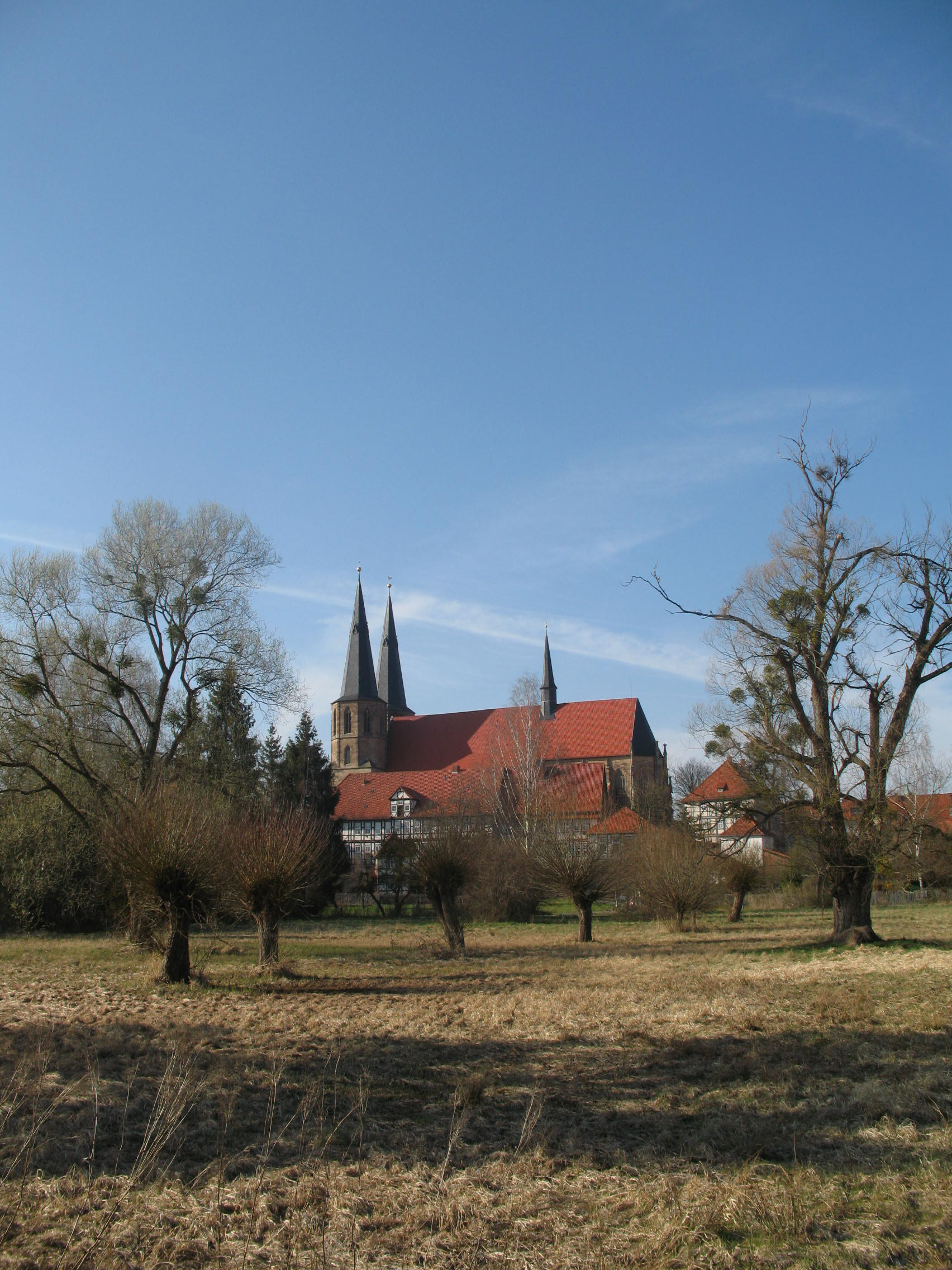 Blick von Süden auf die St. Cyriakuskirche in Duderstadt mit Kopfweiden im Vordergrund